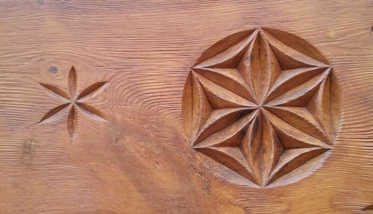 Arpetan: Lo rouson, tot pariér la rosace, est un simbolo empleyê per tôs los Payis arpetans, atant celos de les planes et de les bâsses valês que celos d’hôta montagne. Los prèhistoriens y recognessont un segno solèro a valor protèctrice de les vielyes cultures du payis.